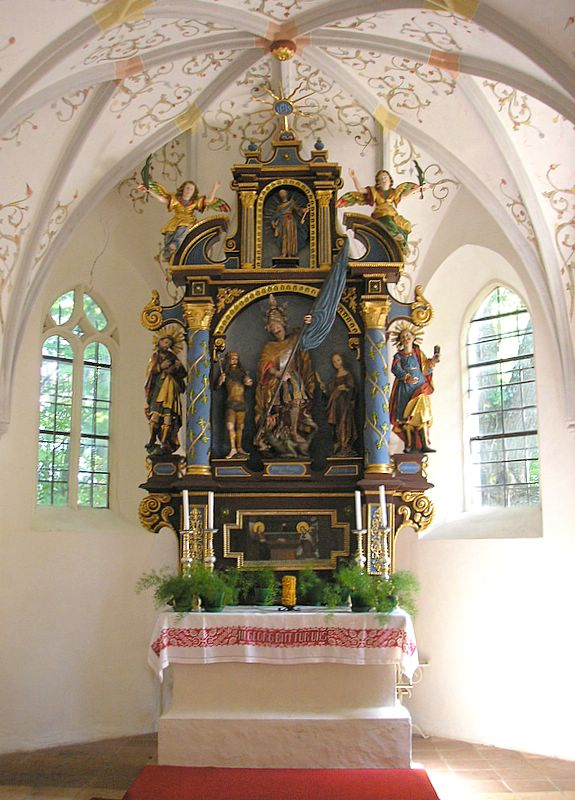 Kapelle St. Georg bei Peißenberg (Landkreis Weilheim-Schongau, Oberbayern). Chor und Hochaltar. Eigene Aufnahme, August 2007 / St. George's chapel near Peissenberg (Upper Bavaria, Germany). Choir and high altar. Own photo, Aug. 2007